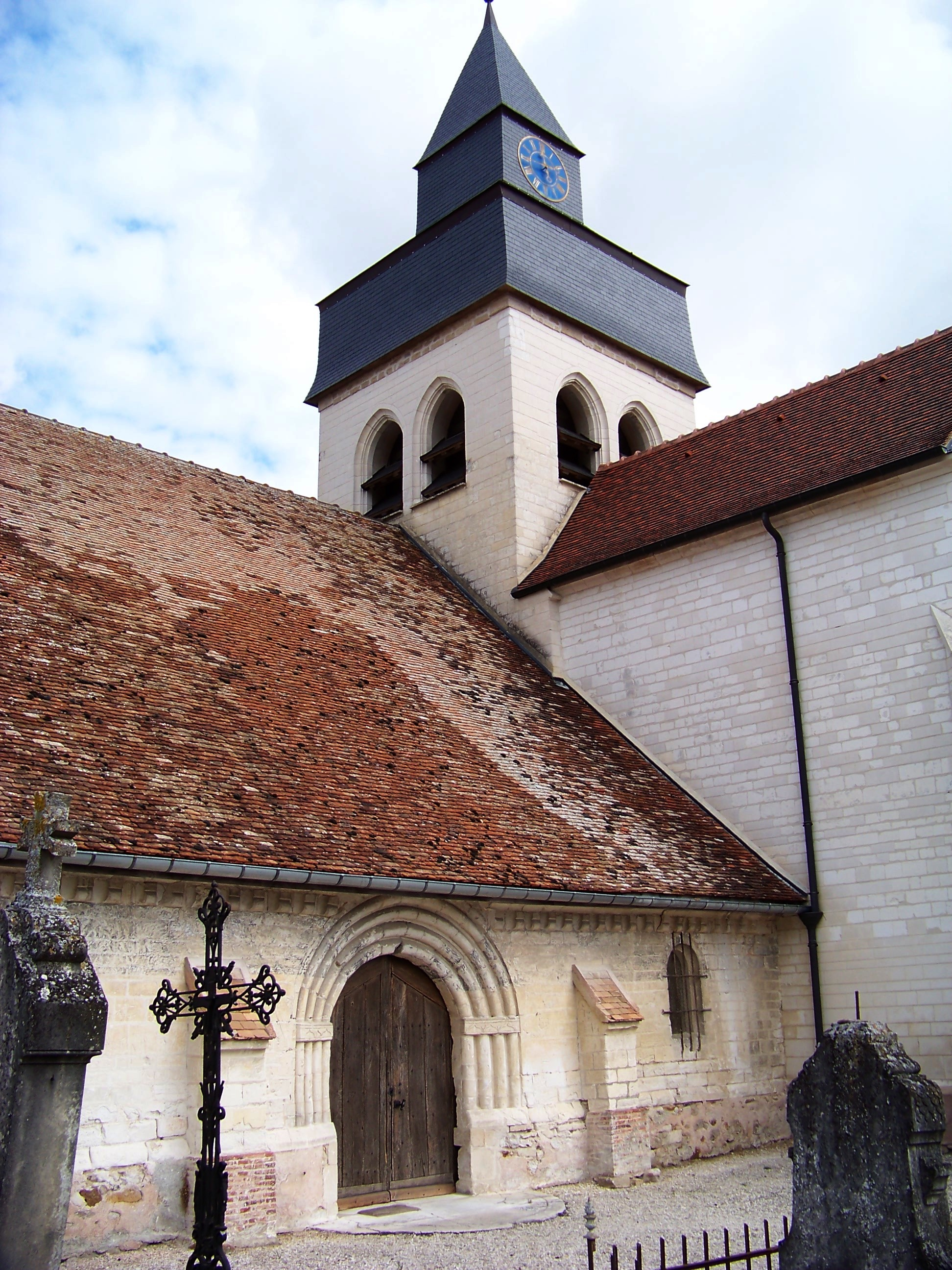 Église Saint-Léonard-et-Saint-Basle, portail méridional et clocher